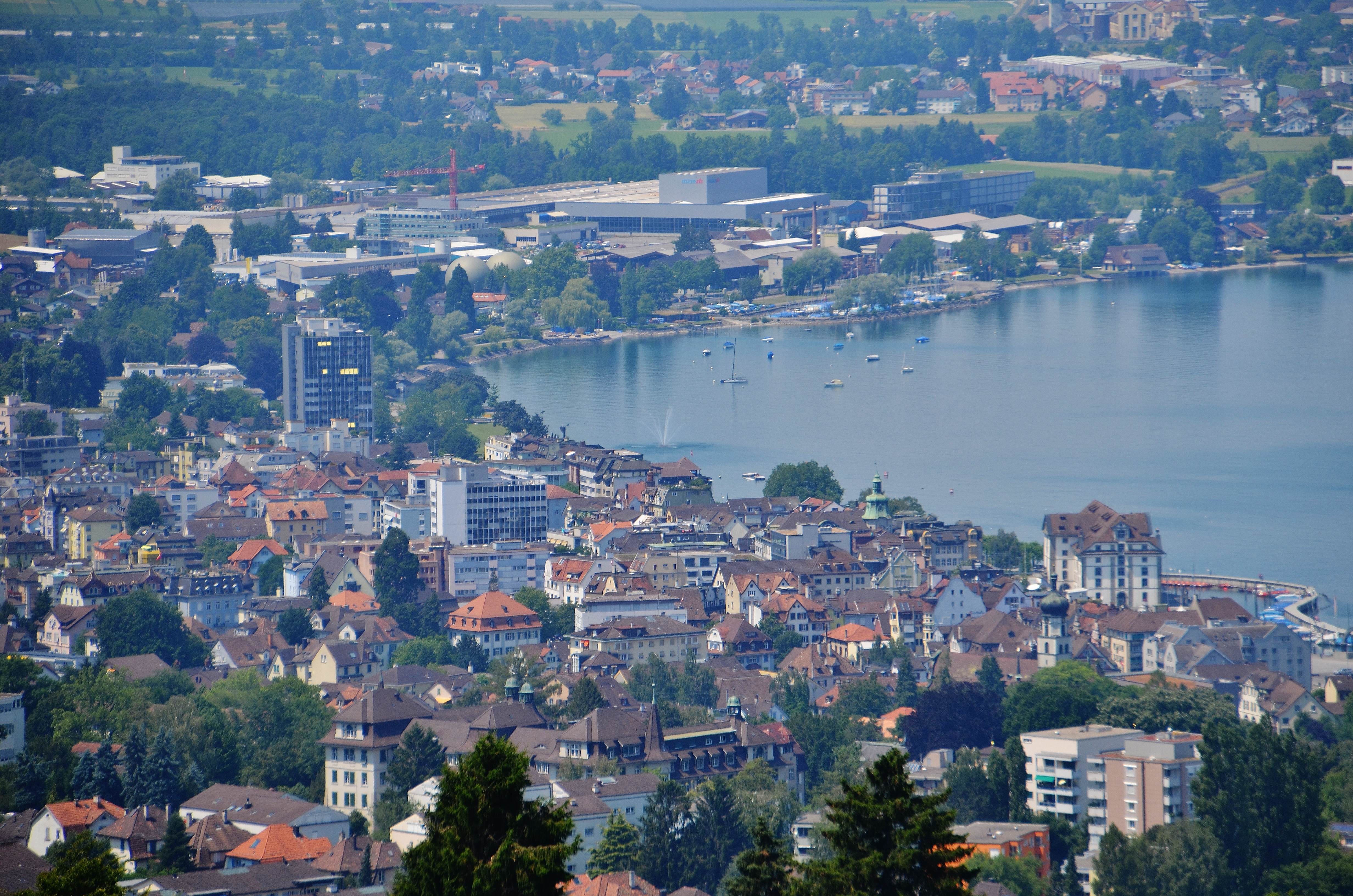 Rorschach